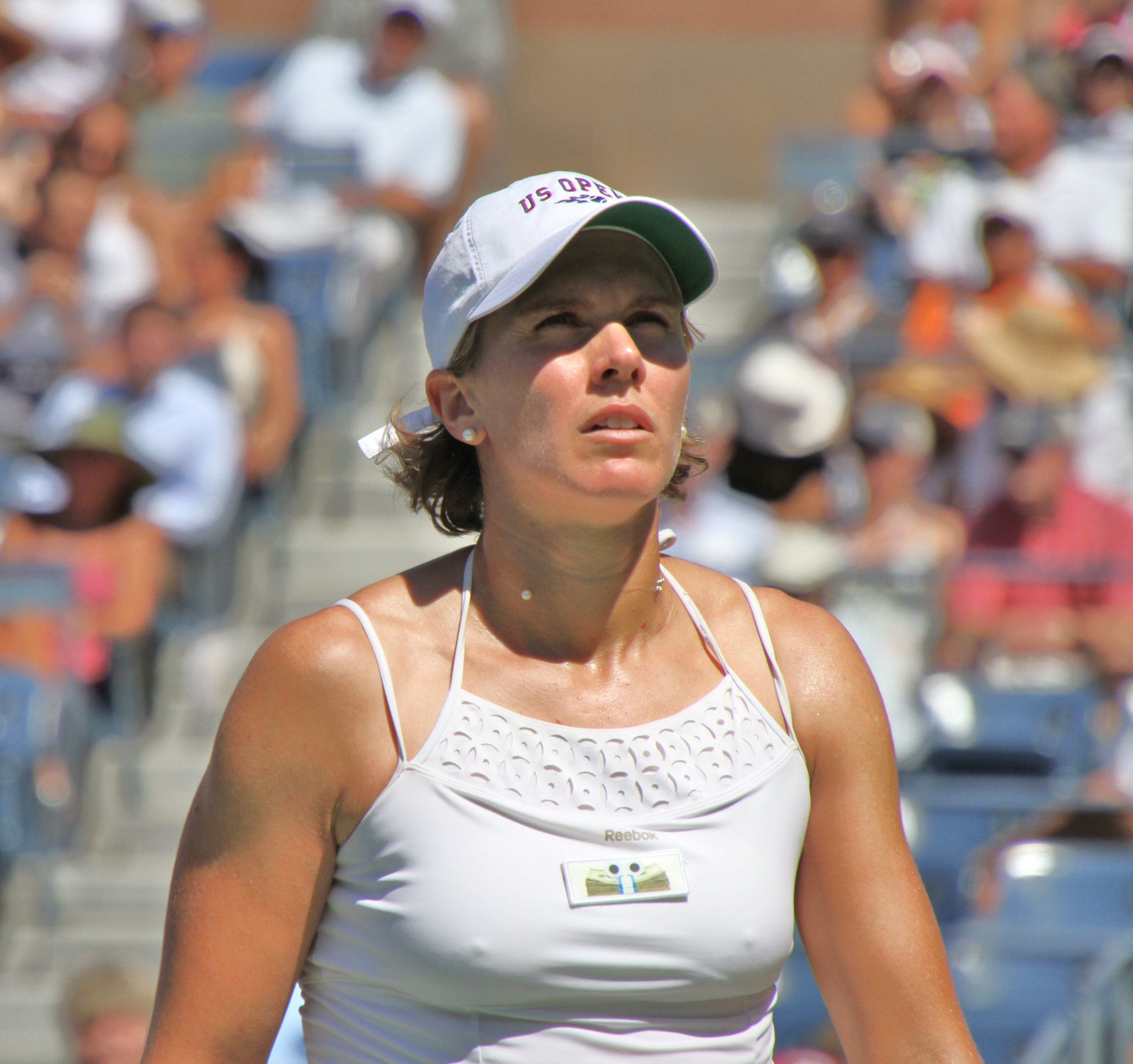 Greta Arn US Open Tennis 2010 1st Round 155